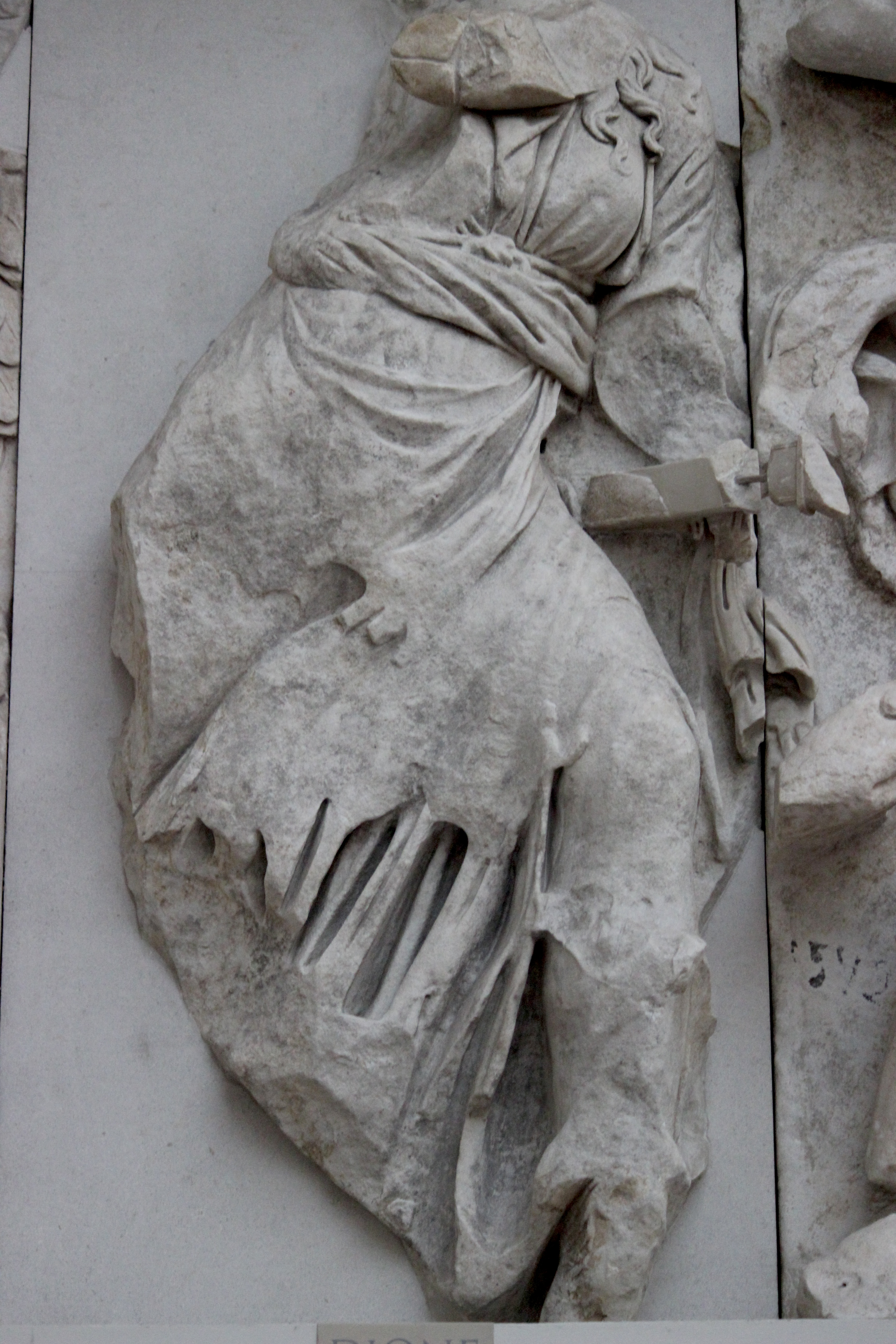 Dione lucha con los gigantes. Altar de Pérgamo.